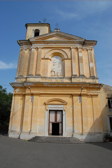 Foto Alvimas